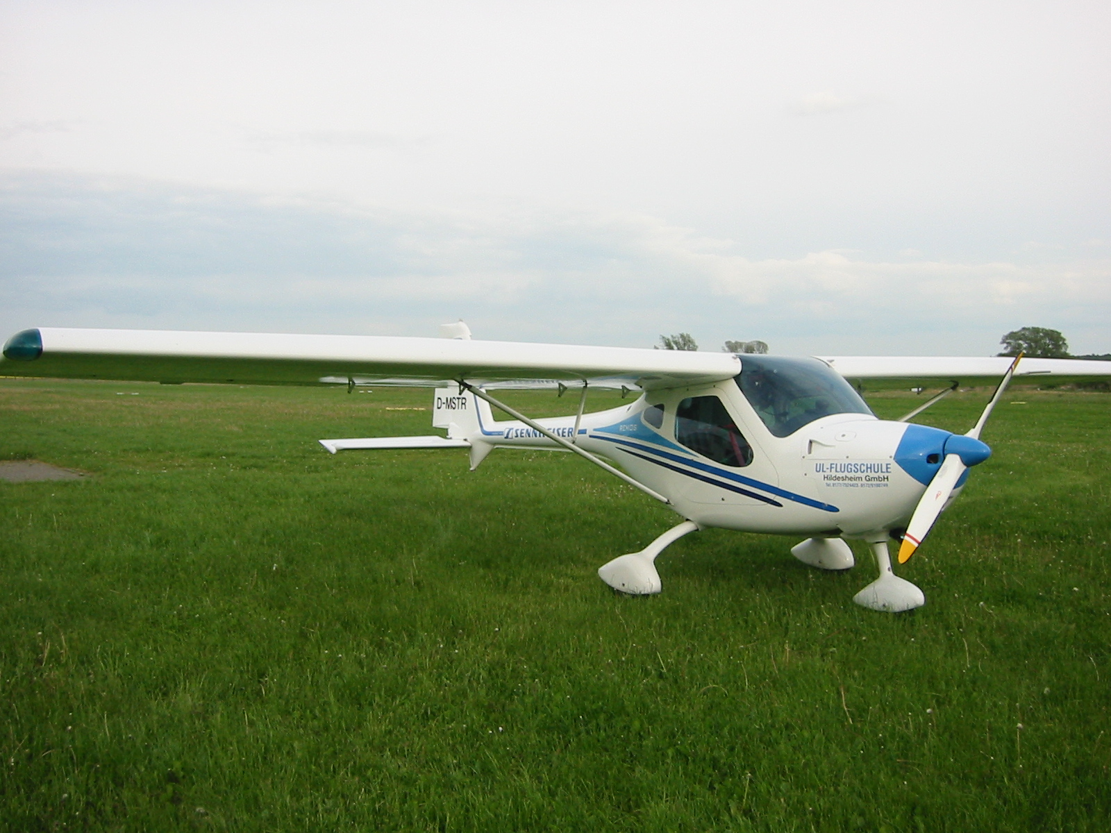 Ultraleichtflugzeug Remos G3-Mirage auf dem Flugplatz Rerik EDCR